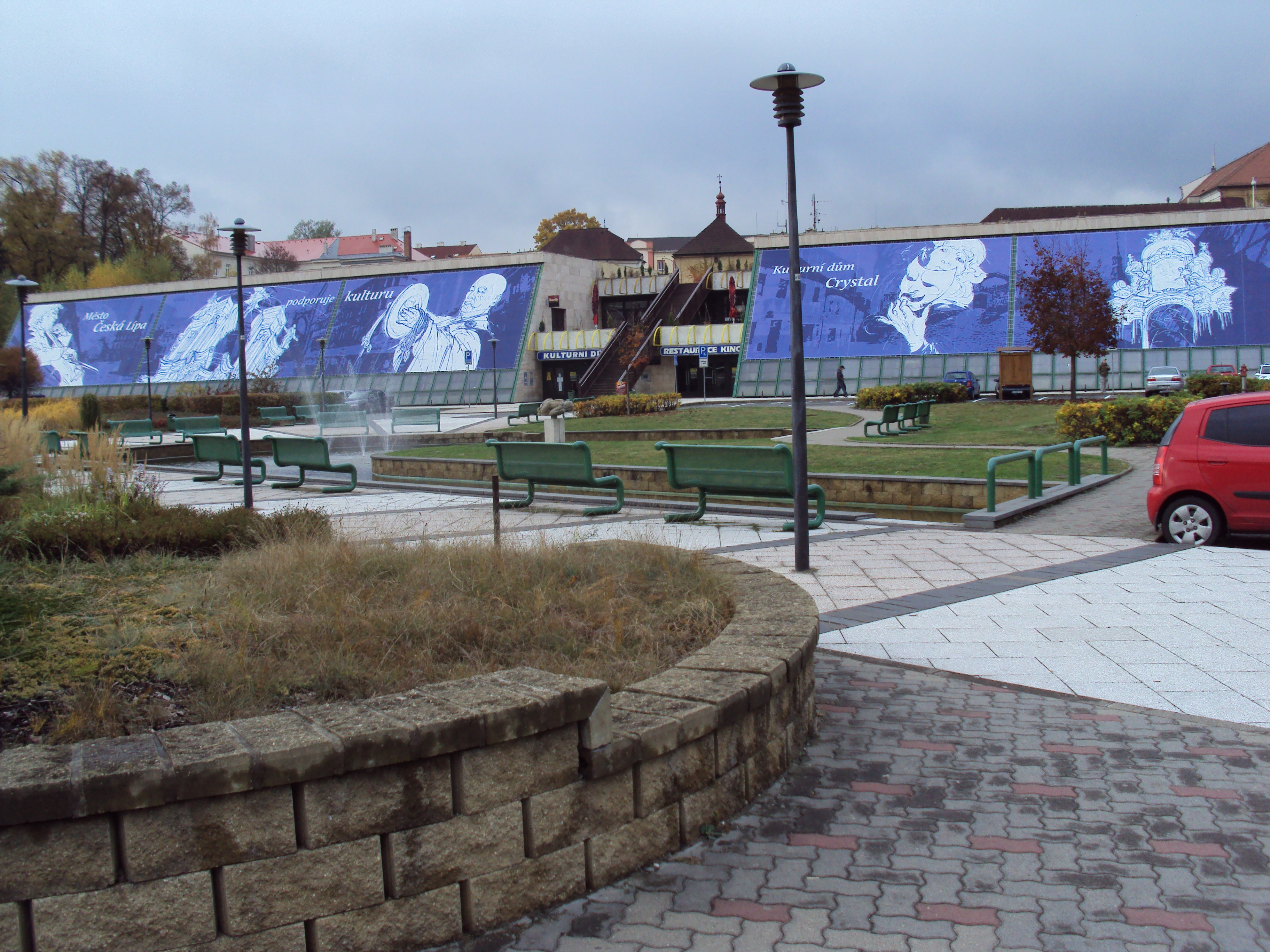 Průčelí kulturního domu Crystal v České Lípě s parčíkem před ním